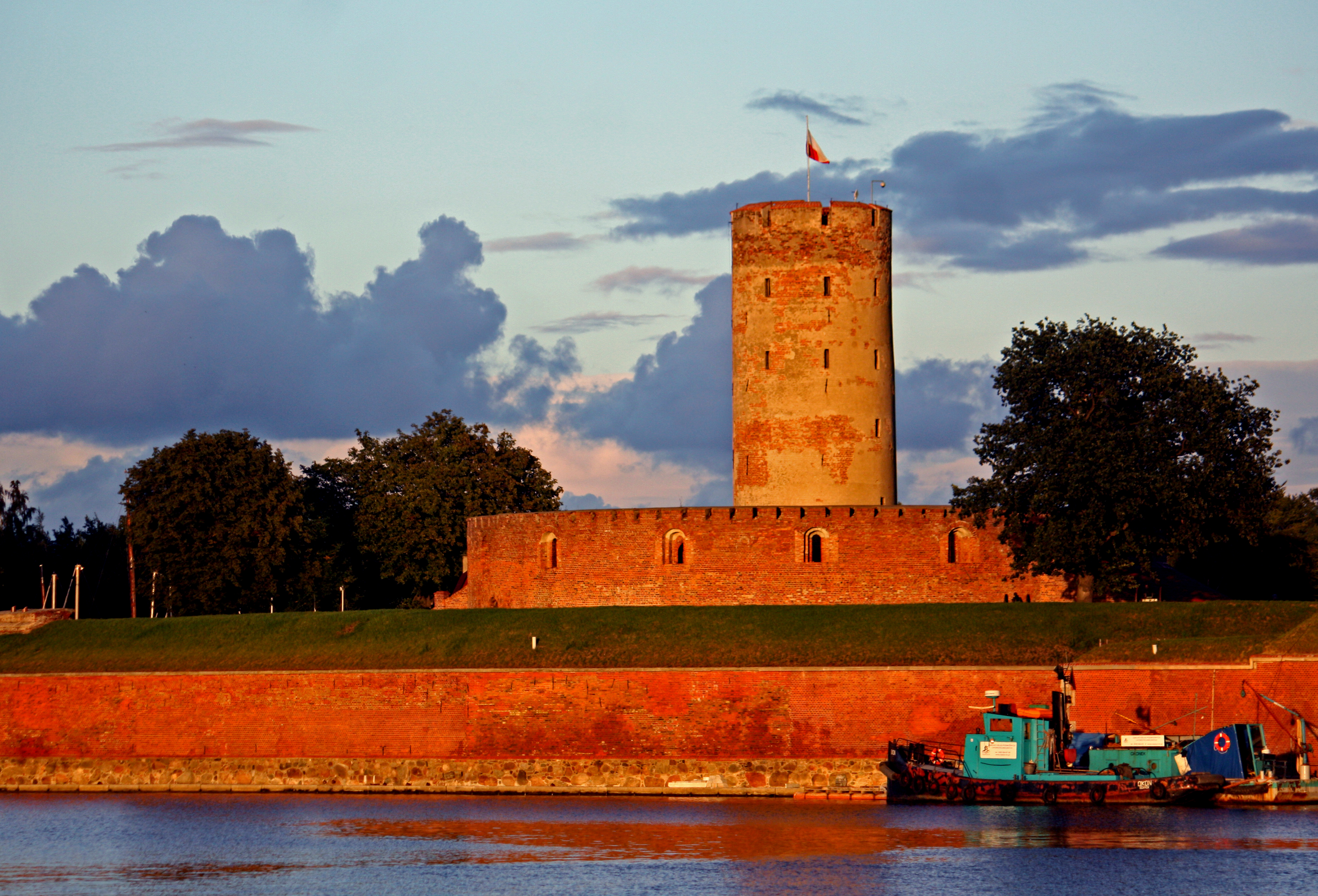 Gdańsk - zespół Twierdzy Wisłoujście